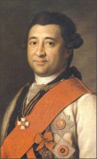 Dieses ist nicht ein Porträt Abram Petrowitsch Gannibals (1696-1781), russischer General äthiopischer Herkunft. Es ist ein Porträt seines Sohnes, Iwan Abramowitsch Gannibal (1735-1801), russischer Admiral.